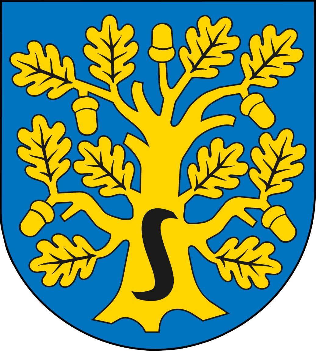 Herb gminy Stromiec.